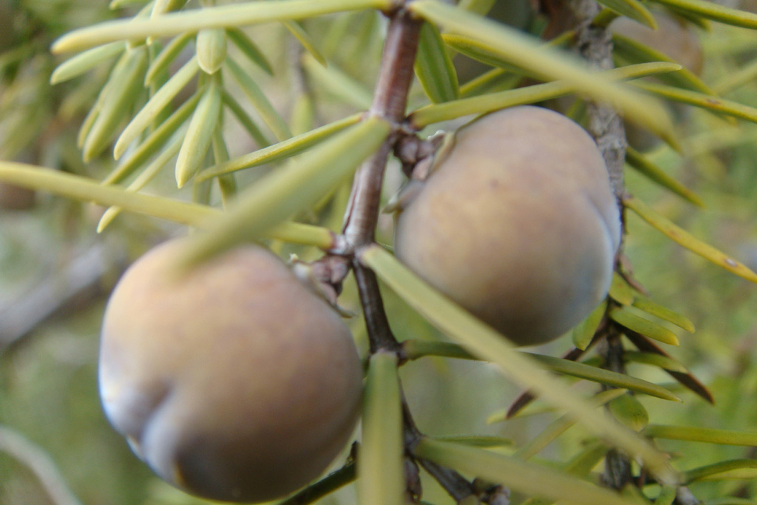 Baies de Juniperus oxycedrus dans le massif du Luberon, Roussillon, Provence, France